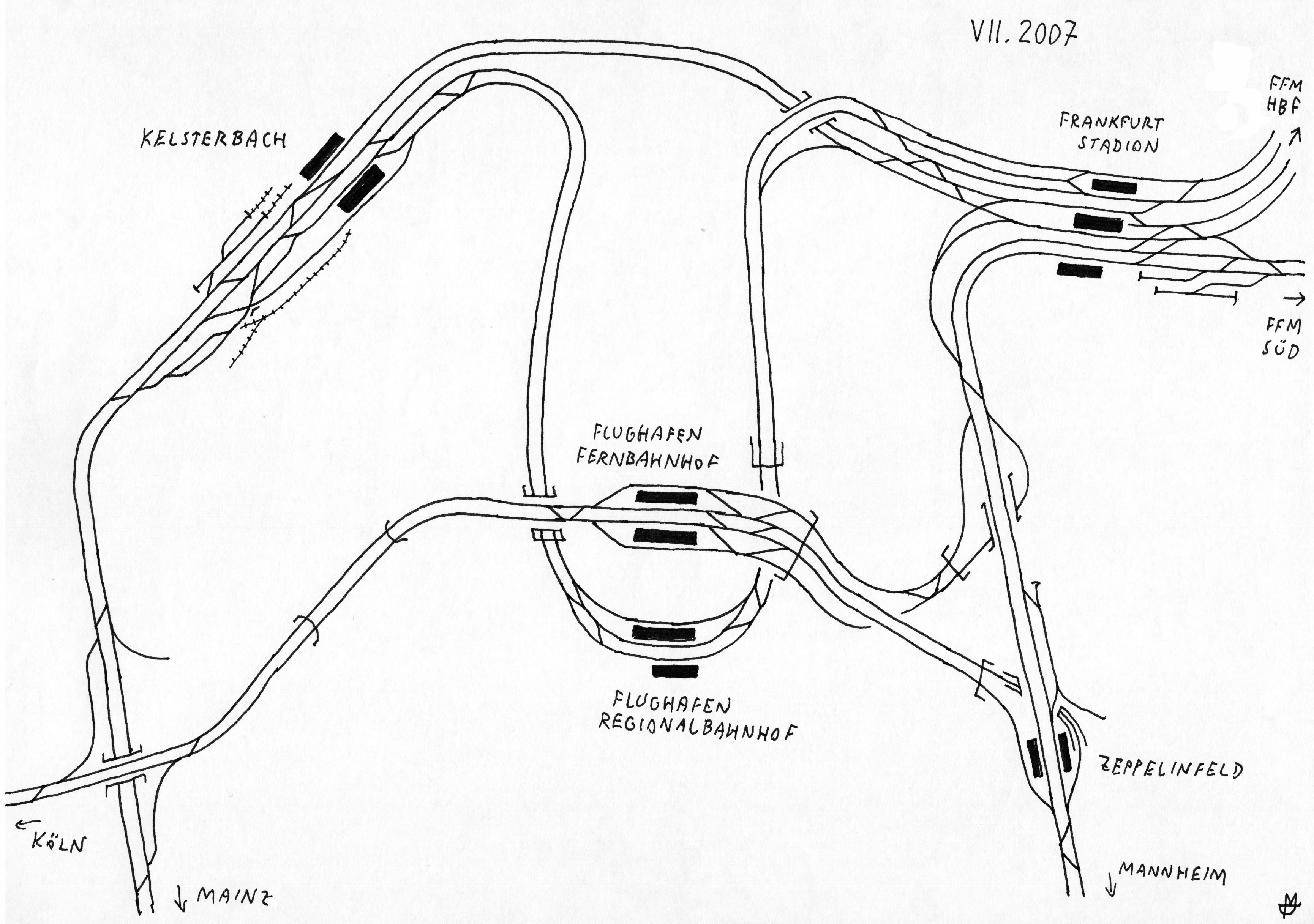 Der Plan zeigt die Gleisanlagen der beiden Frankfurter Flughafenbahnhöfe Frankfurt (Main) Flughafen Regionalbahnhof Frankfurt (Main) Flughafen Fernbahnhof sowie deren Einbindung in das Netz der DB.